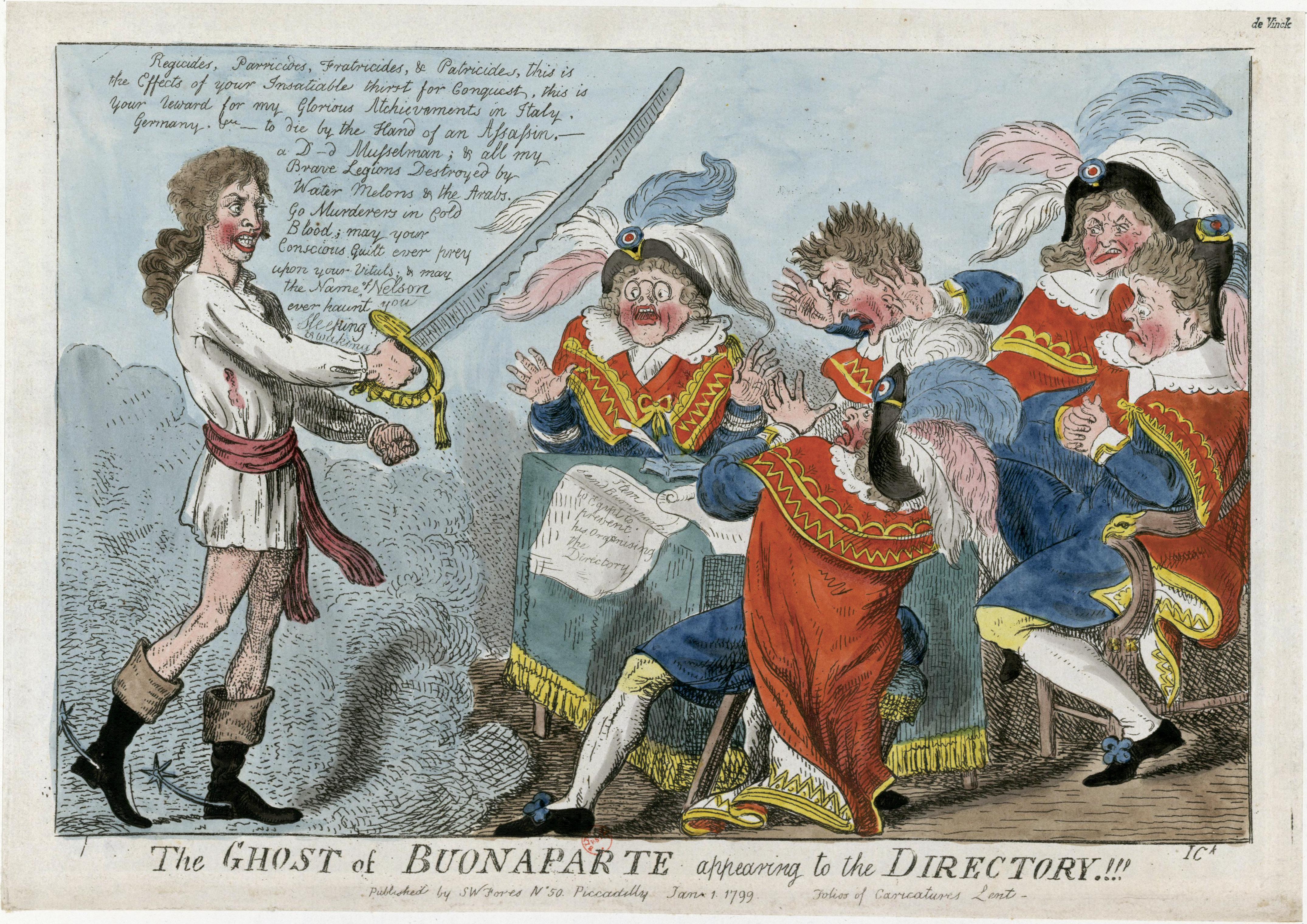 Estampe.